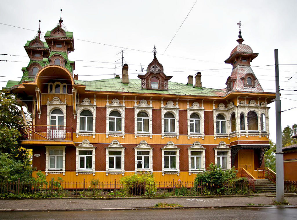 Восточный фасад Дома С.Г. Гордеева в Рыбинске.